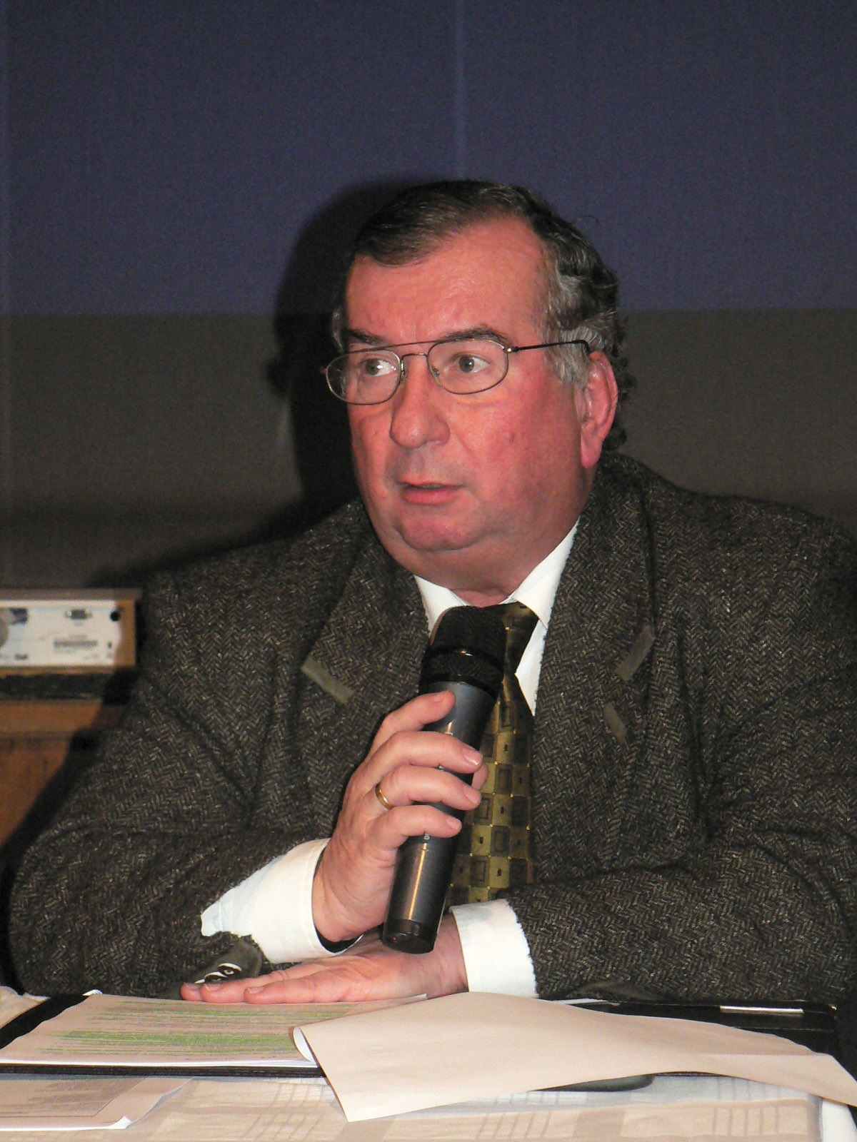 Emesz Lajos 2010 novemberében